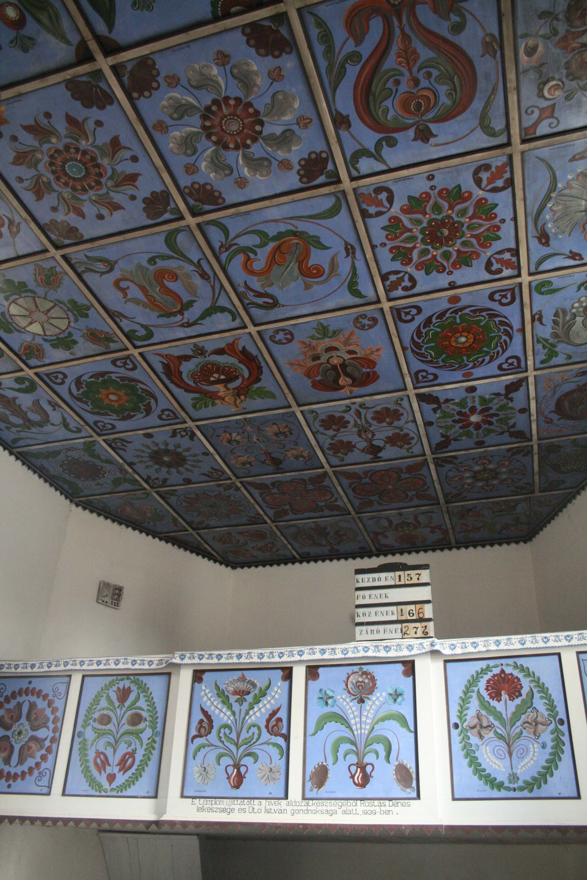 Biserica unitariana 01